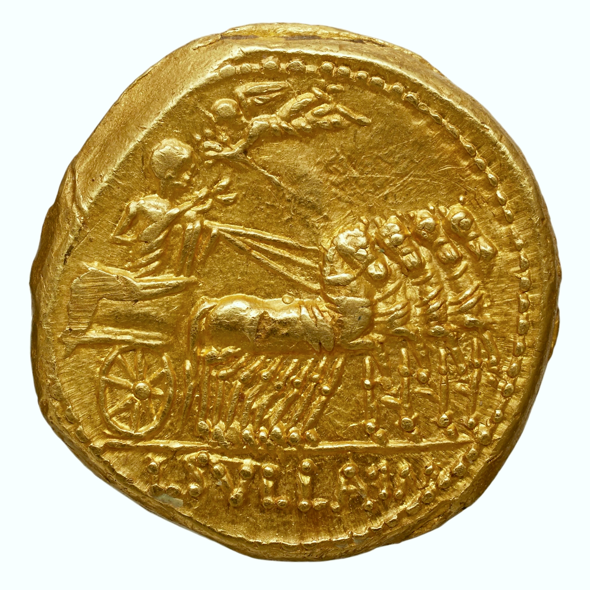 Aureus de Lucius Manlius Torquatus. Or, 10,63 gr. Revers : L·SVLLA·IM (Lucius Sylla imperator) Sylla dans un char triomphal à droite (quadrige) couronné par la Victoire volant à gauche (Lucius Manlius Torquatus était l’un des lieutenants de Sylla et légat proquesteur pendant la guerre mithridatique). 82 av.JC. Collection BnF : REP-21460 - RRC 367/4 – B.3 (Manlia)